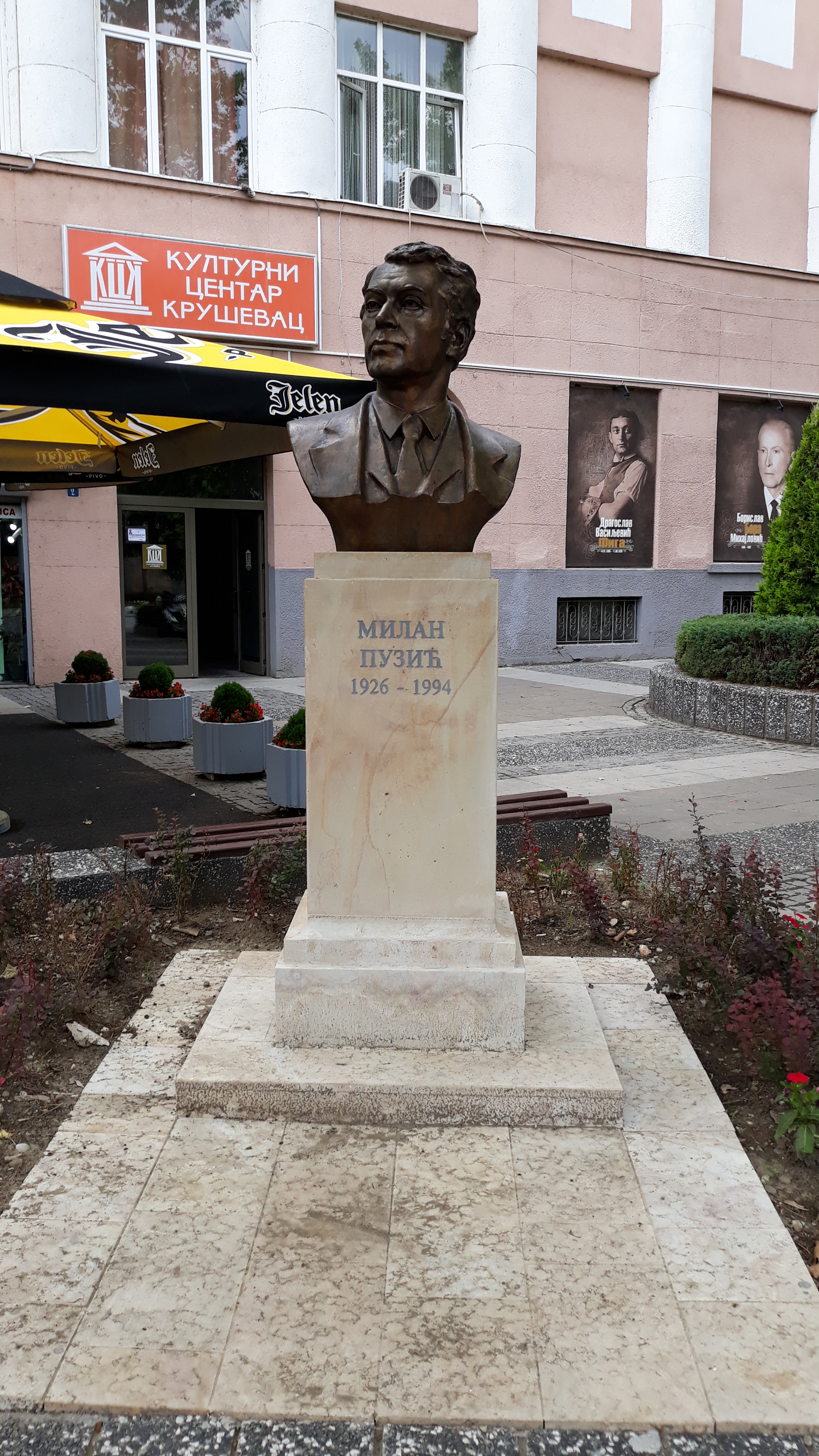 Бисте крушевачким глумцима испред зграде Културног центра у том граду.